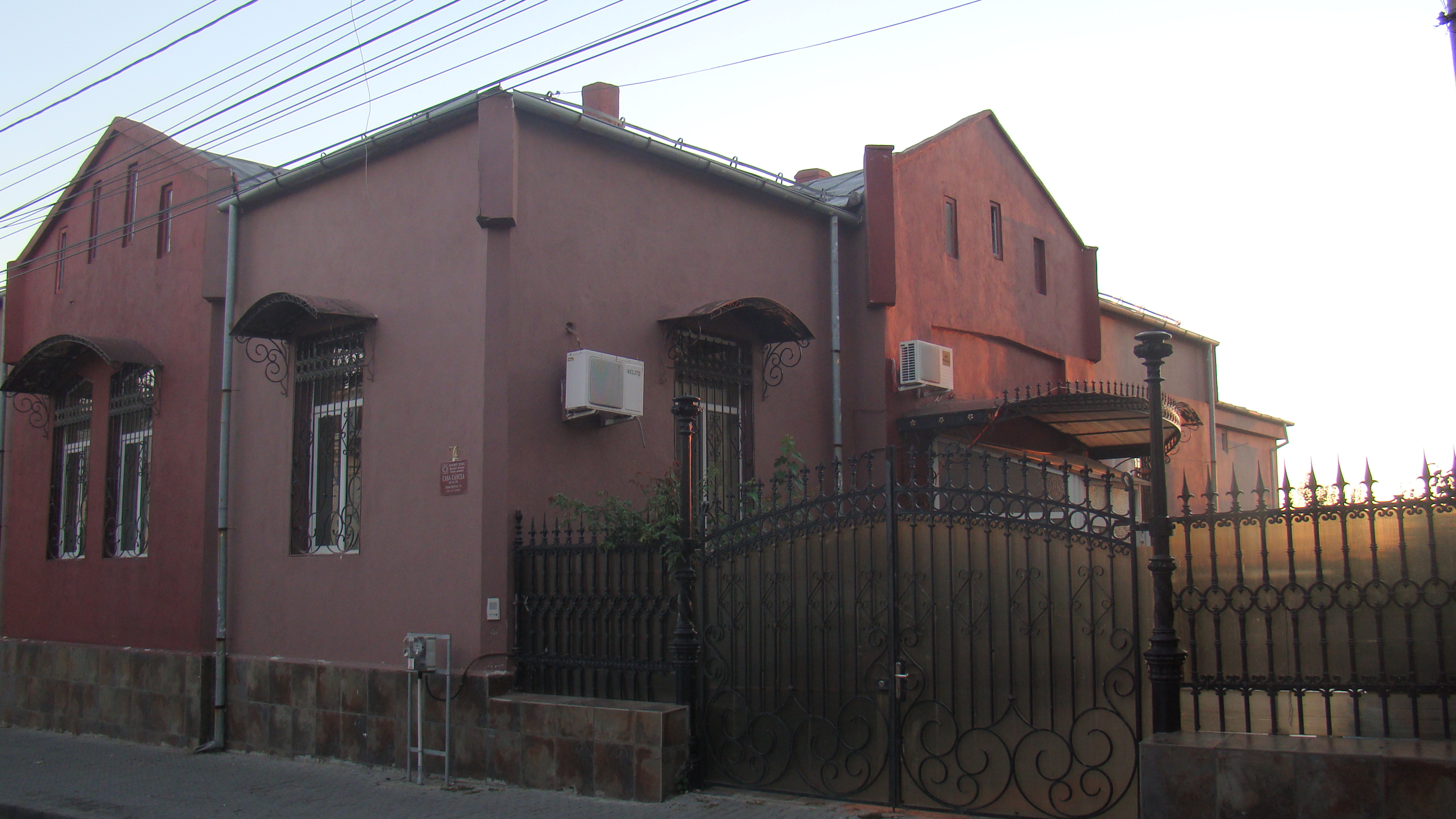 Casa Câncea